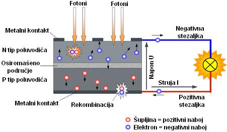 Fotoelektricna konverzija u PN spoju